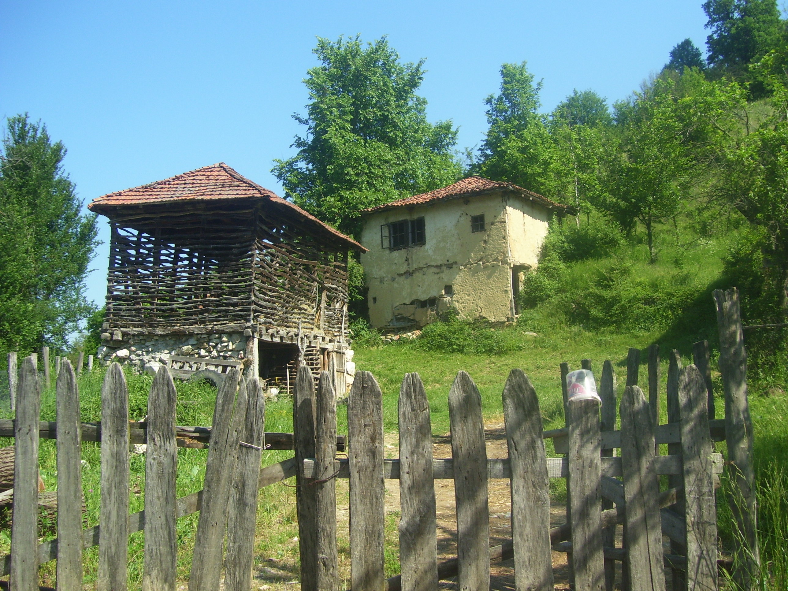 Стари къщи в село Поганово, Община Цариброд, Сърбия.